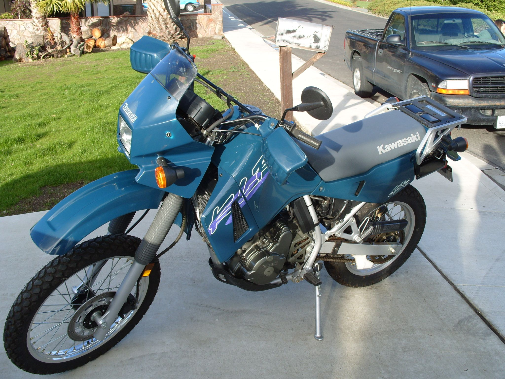 My new wheels Kawasaki KLR 650